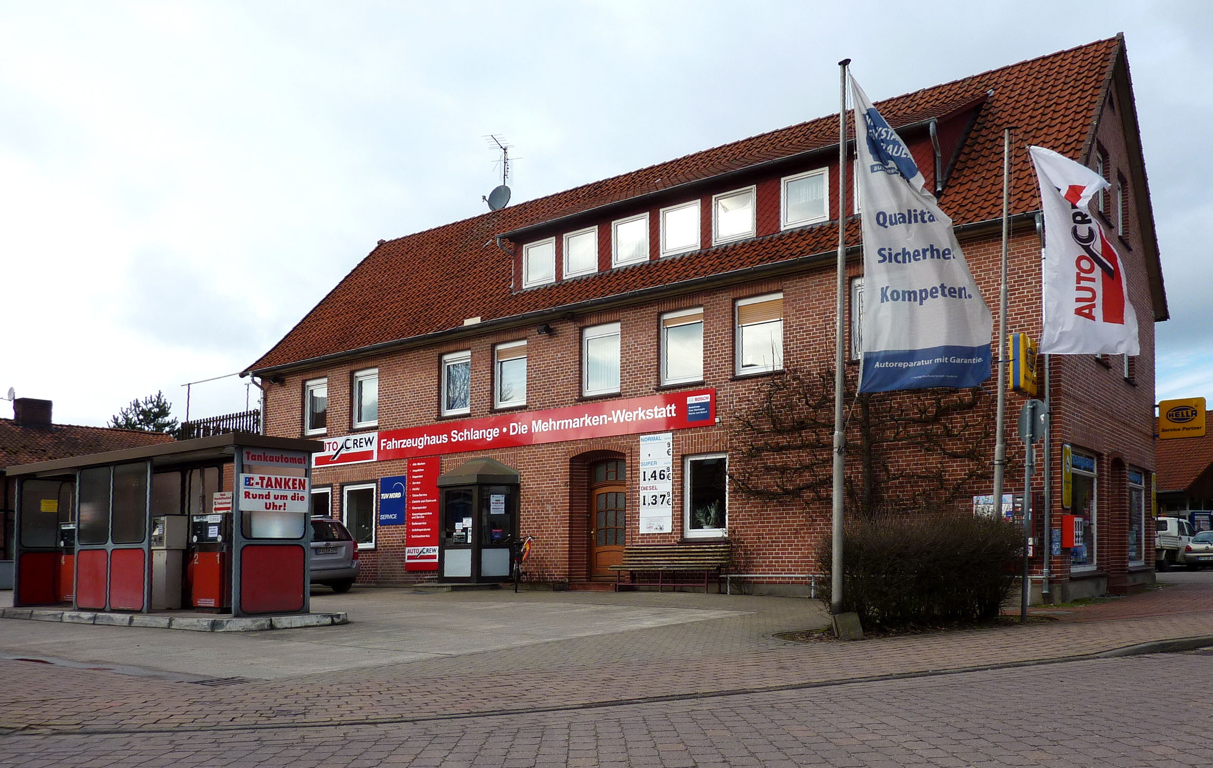 Ein Fahrzeughaus mit langer Tradition im Ortszentrum von Wietzendorf, Lüneburger Heide, Niedersachsen.